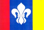 Česky: vjaka obce Soběchleby